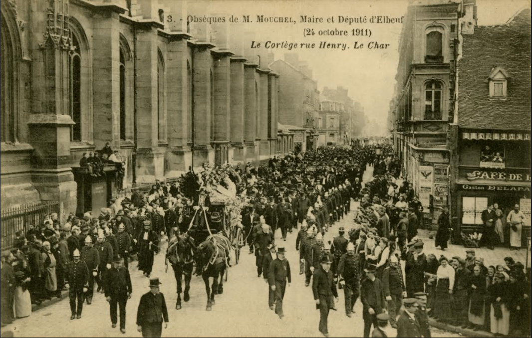 Charles Mouchel : ses obsèques le 24 octobre 1911 à Elbeuf rue Henry